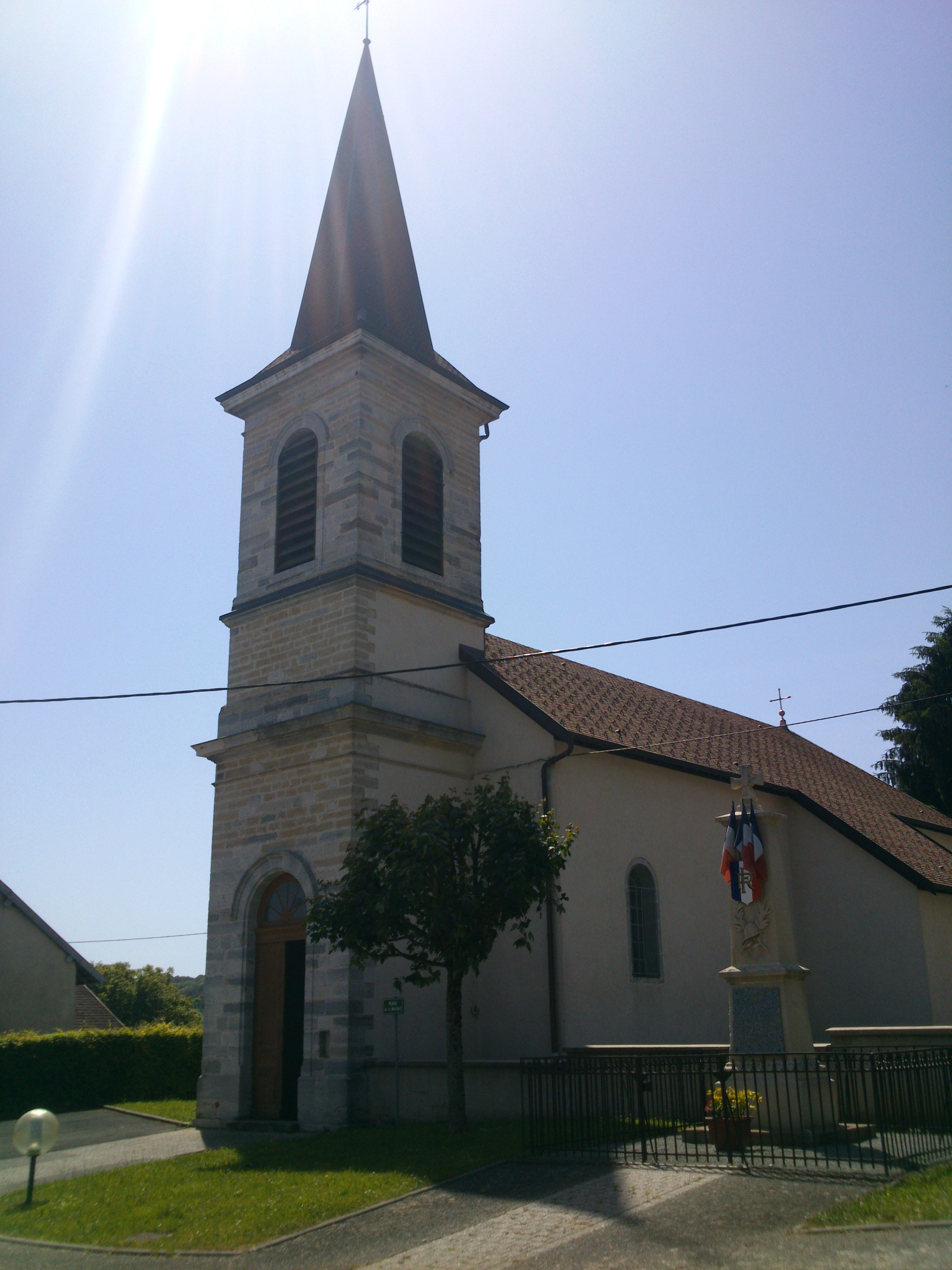 Eglise de Vellerot-lès-Belvoir, Doubs, France